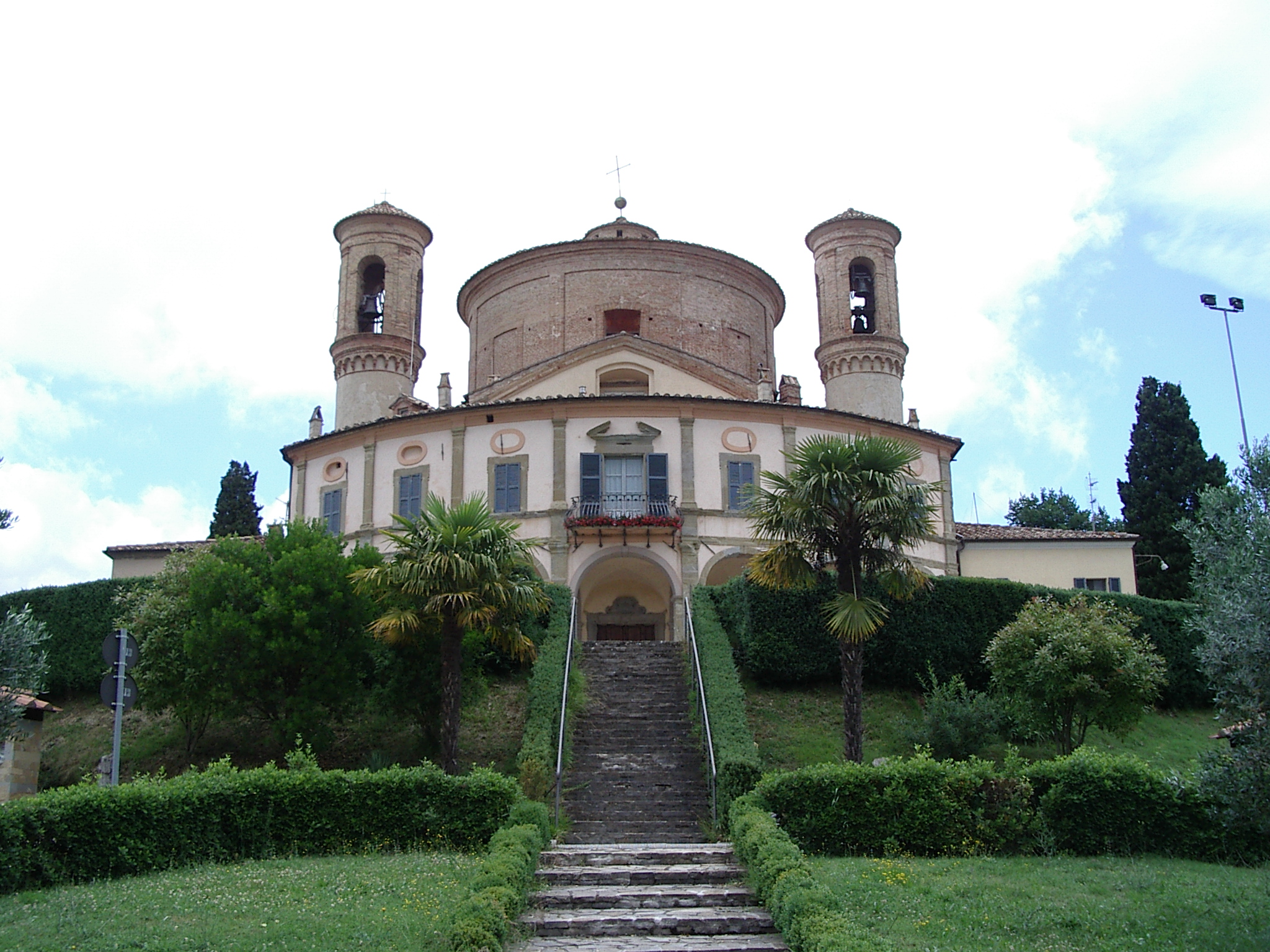 Santuario della Madonna di Belvedere - Città di Castello - Ombrie - Italie